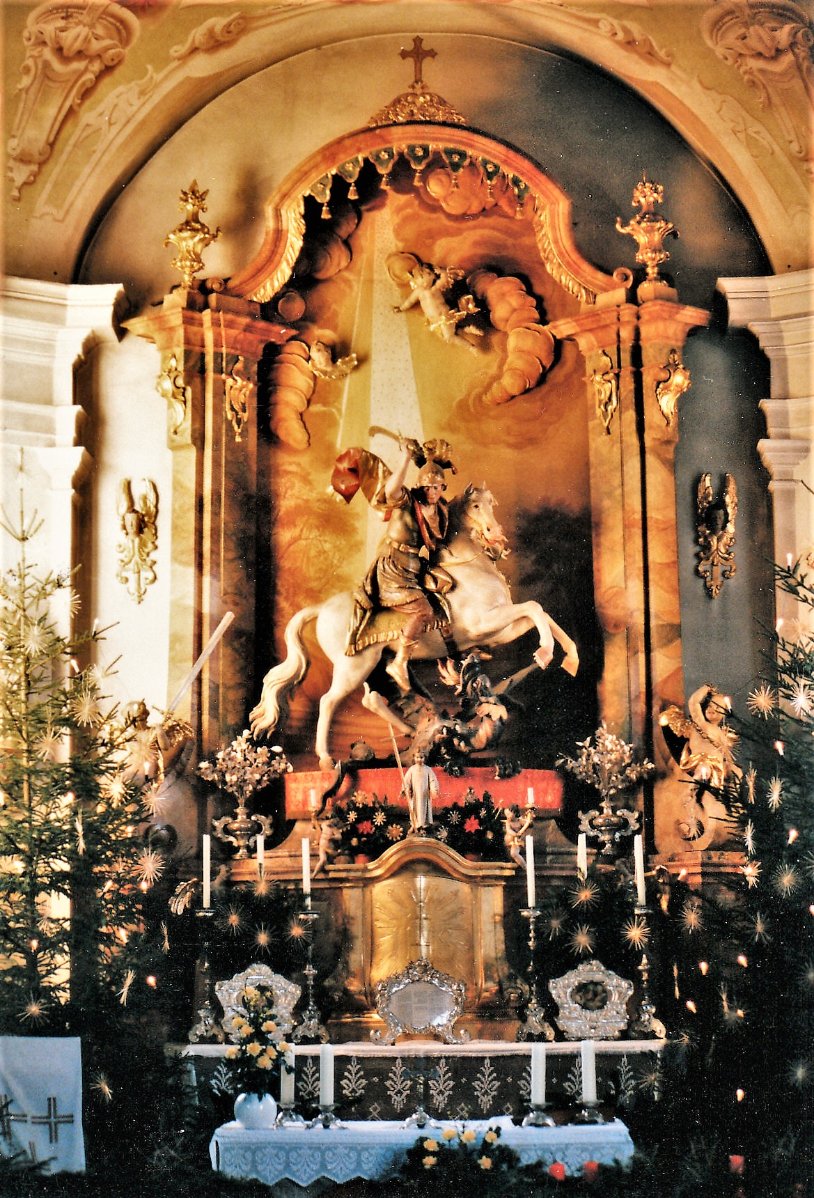 St. Georg (Bichl): Hochaltar von Johann Baptist Straub (Drachenkampf des heiligen Georg) (1752)